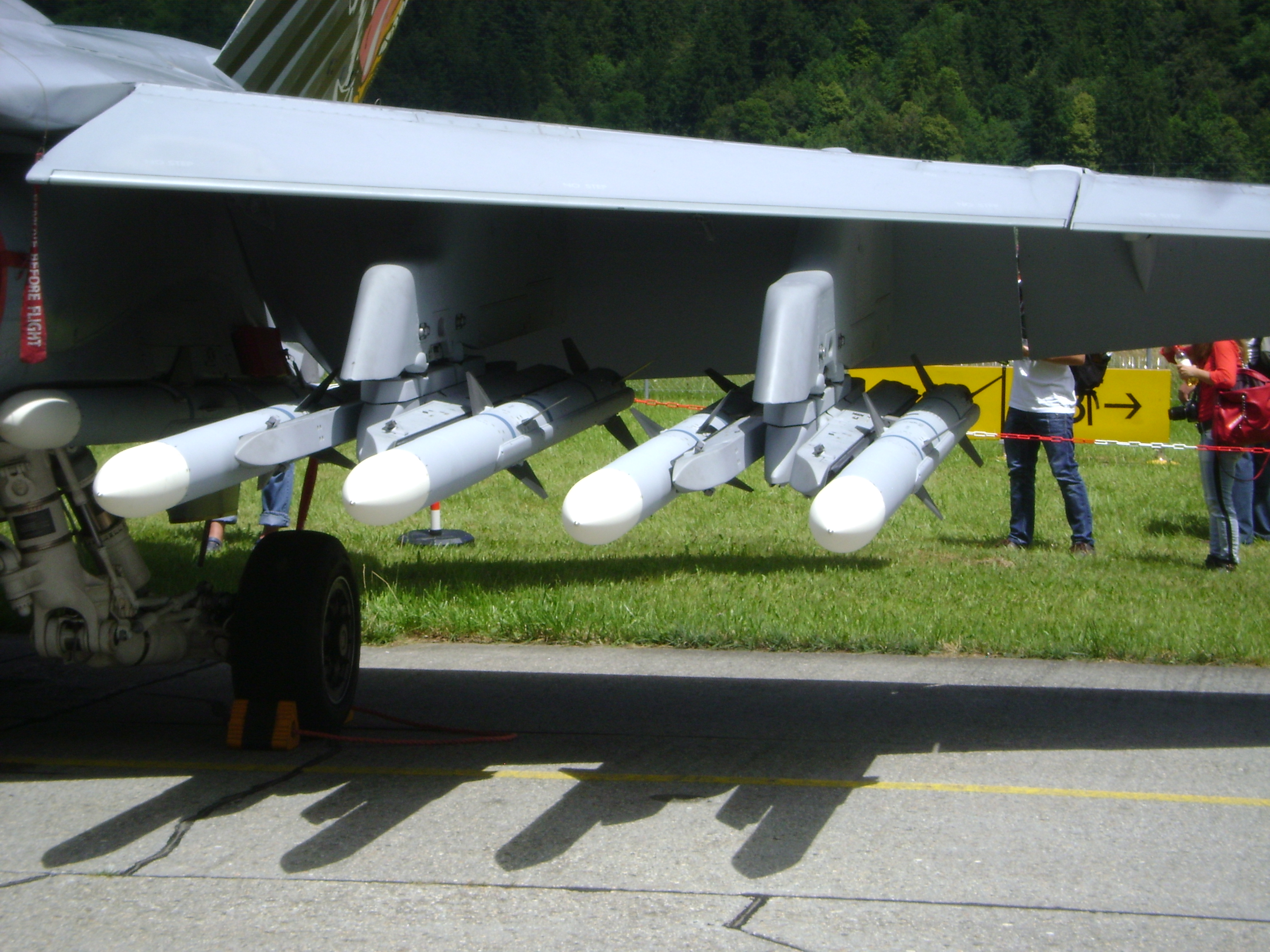 Zweifach AMRAAM Werfer an einer F/A-18C (J-5011) der Schweizer Luftwaffe während der „75 Jahre Militärflugplatz Meiringen“ Feier